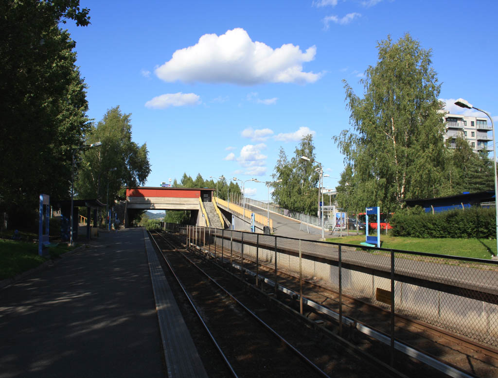 Haugerud T-banestasjon sett i retning mot Trosterud.